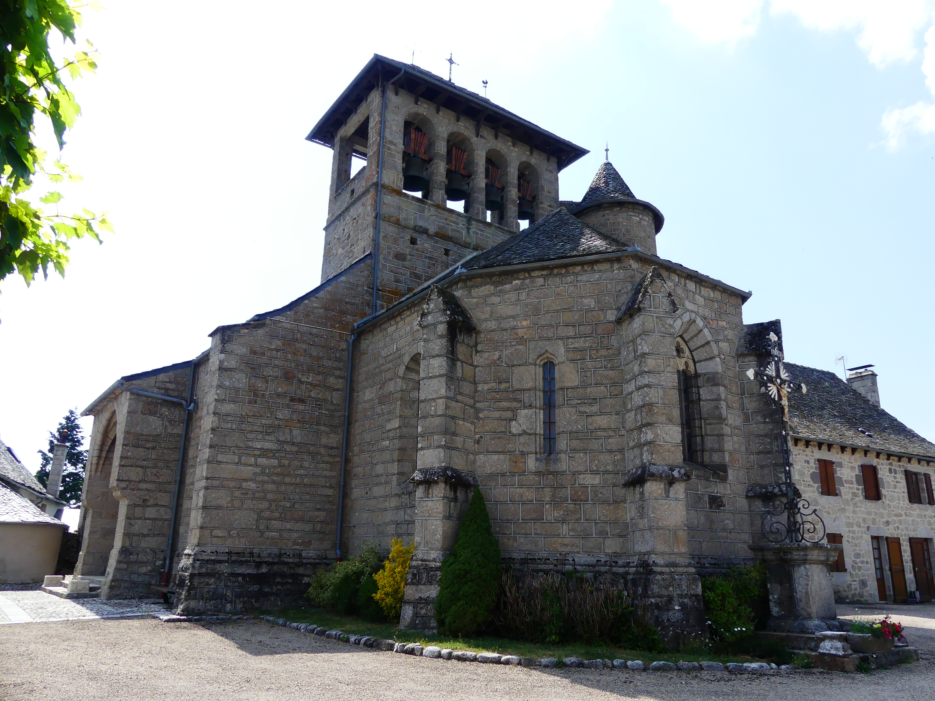 L'église de Saint-Symphorien-de-Thénières, Aveyron, France.